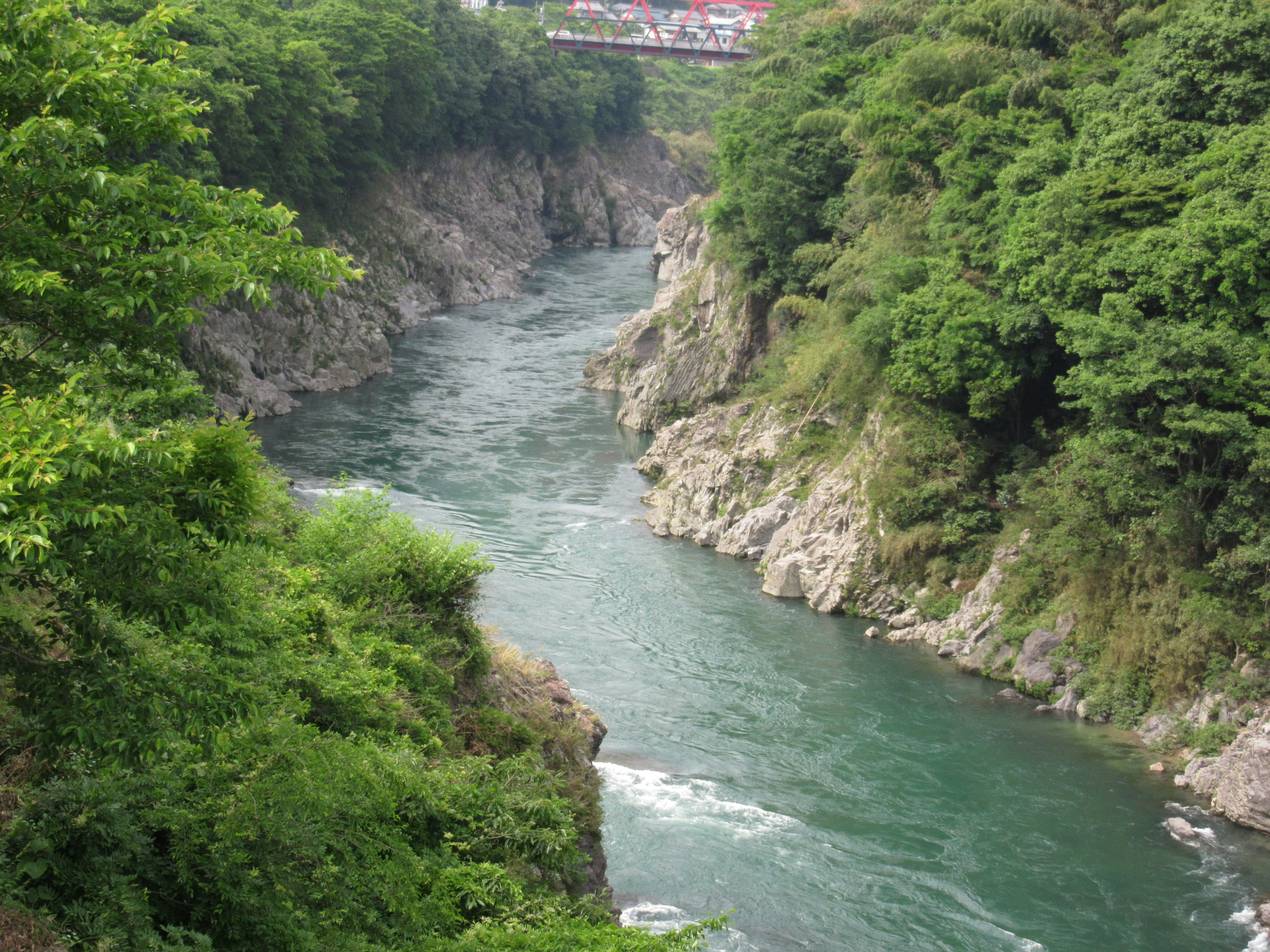 飛水峡（道の駅七宗下）